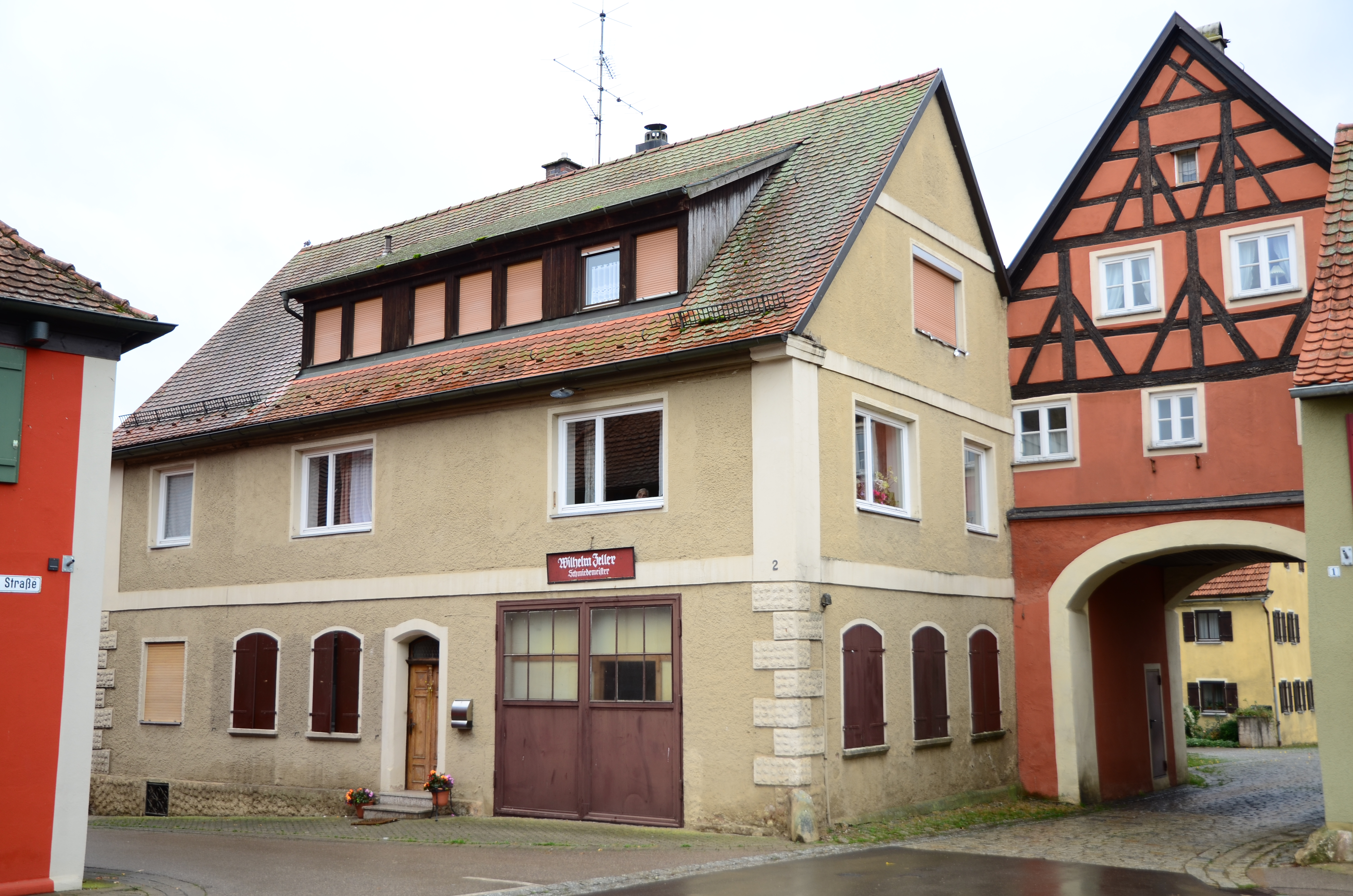 Weiltingen, Marktplatz 1